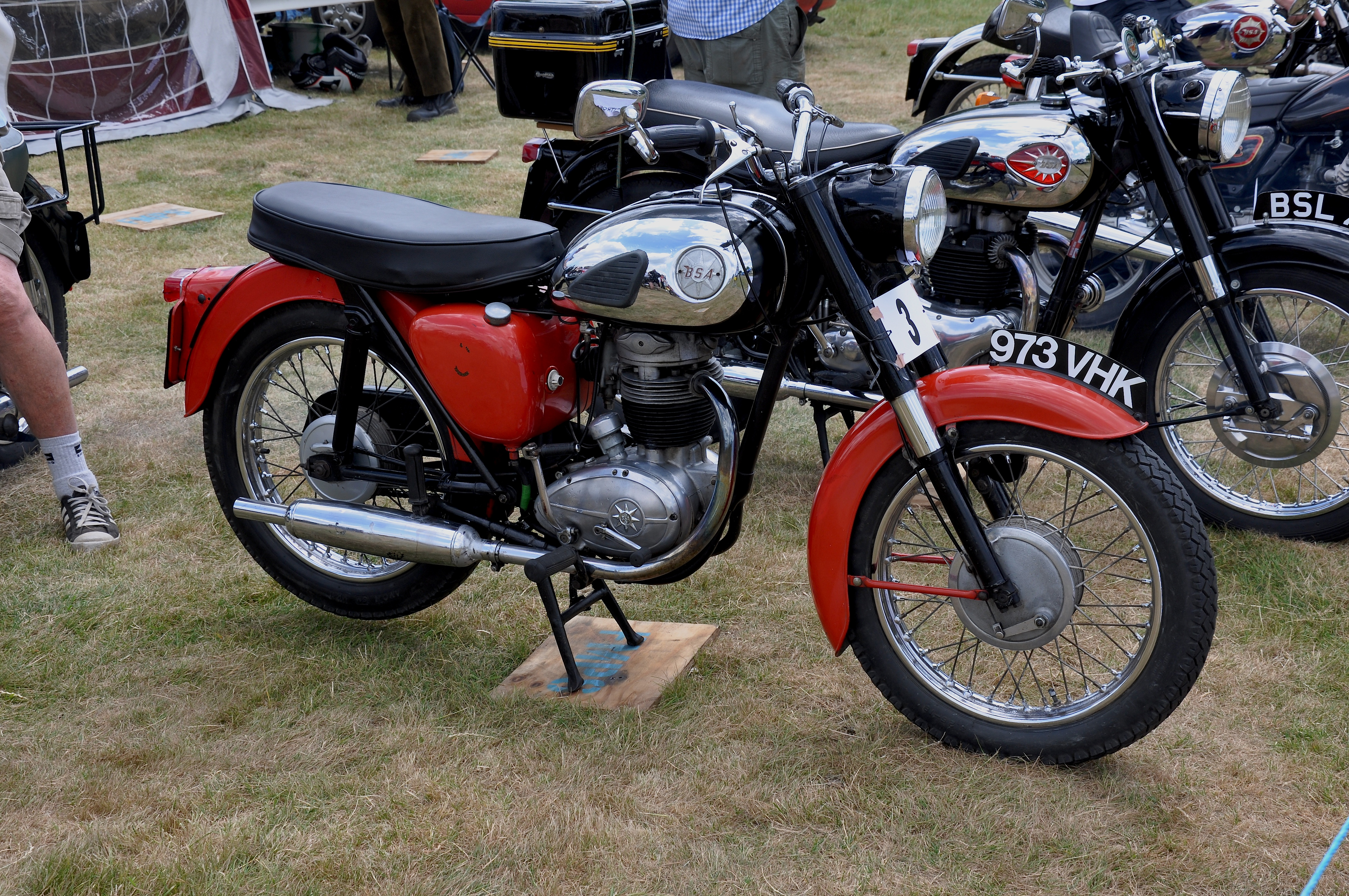 B.S.A. B40, 350 cc, 1962